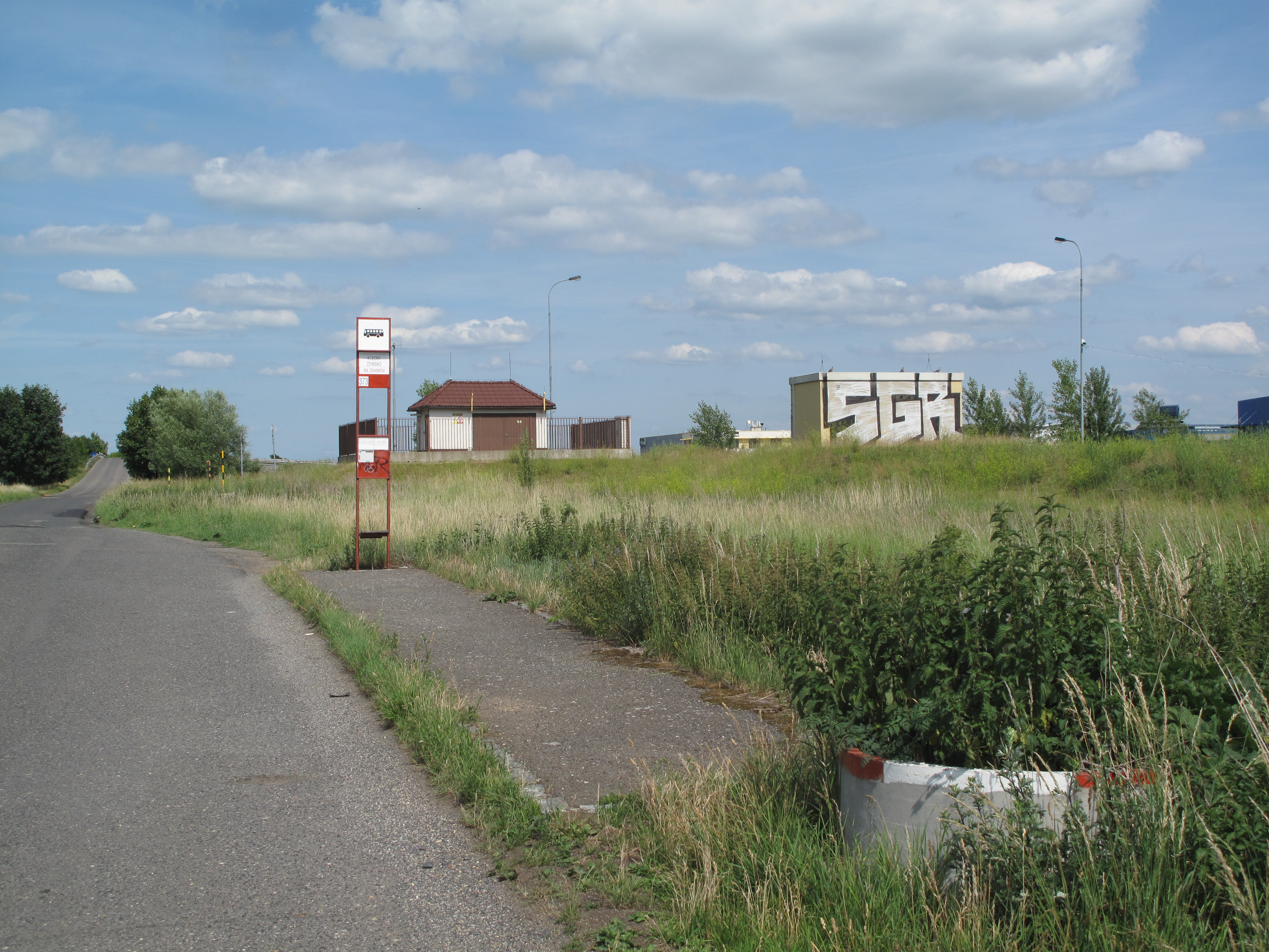 Zdibsko, zastávka